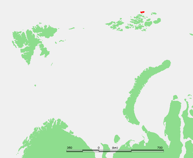 Rudolf, Frans Jozefland